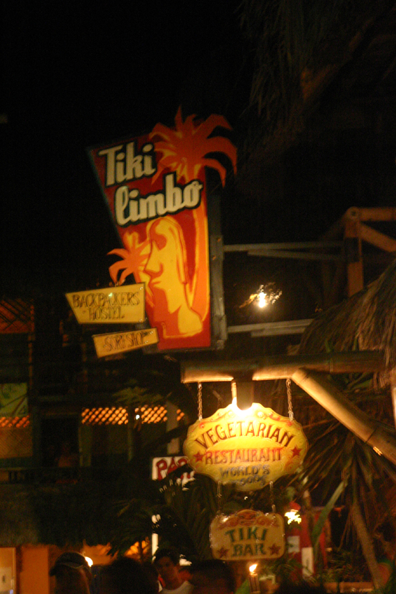 Montañita - Ecuador Author: Usuario:Alfredo Molina Date: 26 March 2005